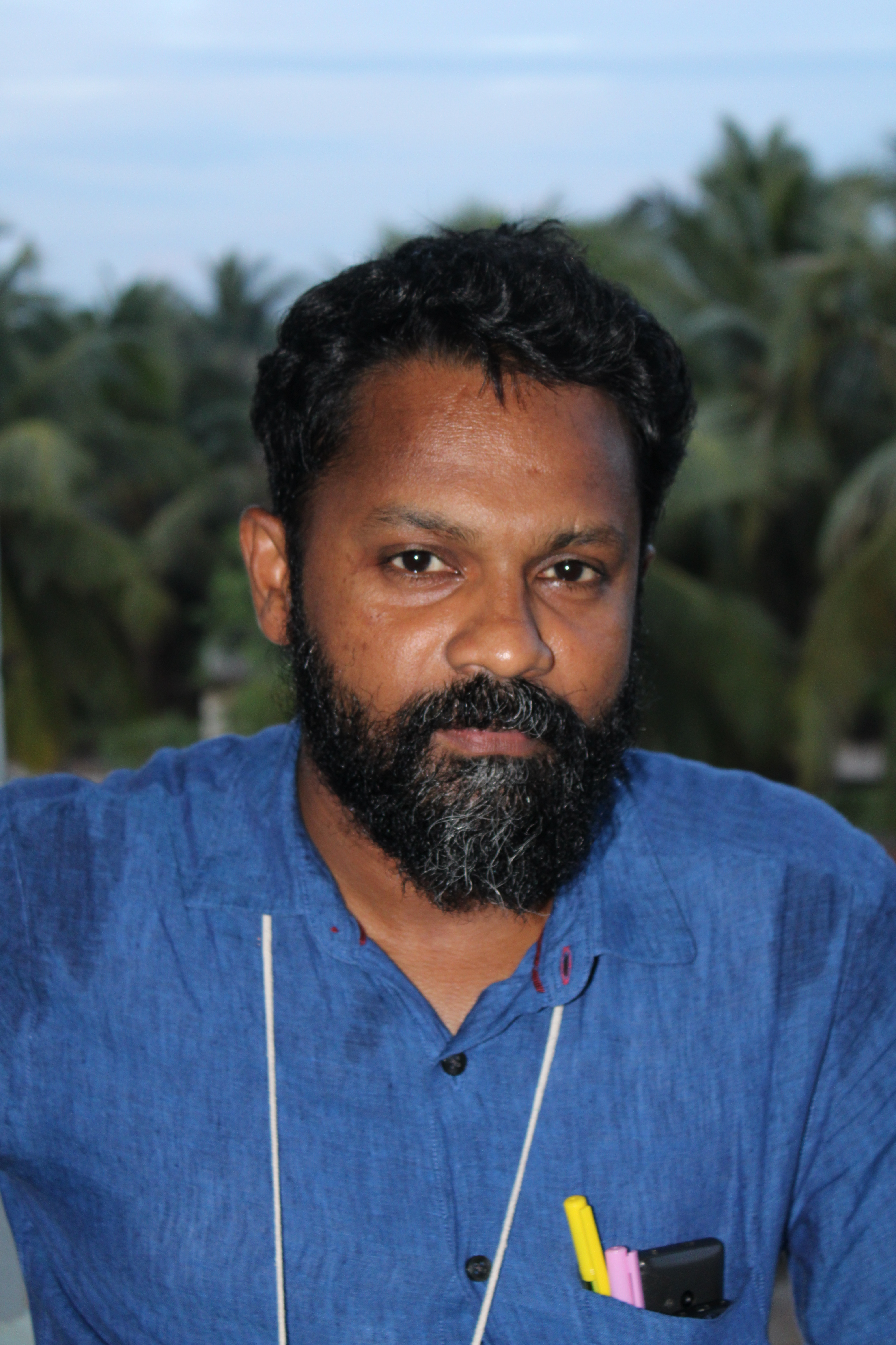 അനുമതി